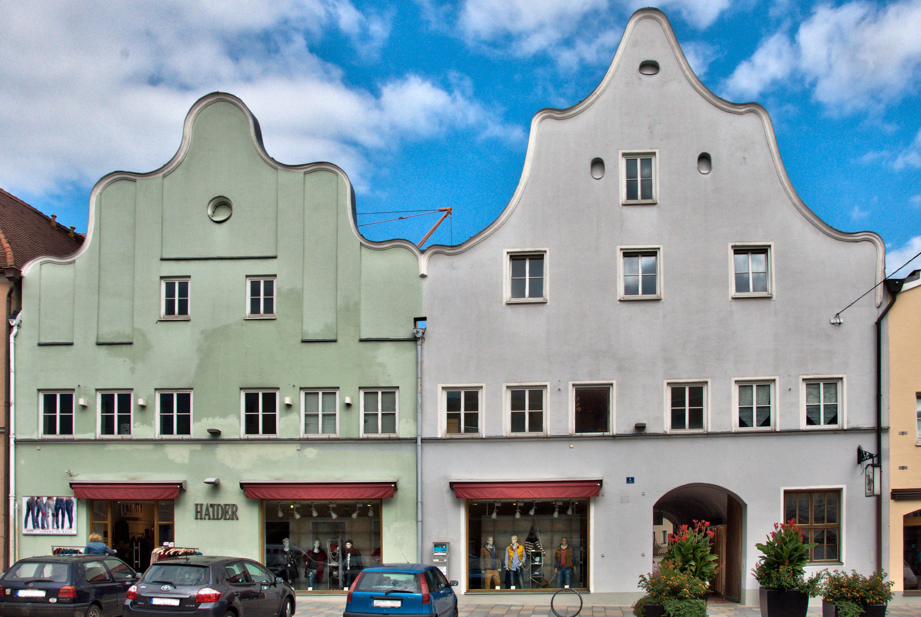 Ehemaliges Gasthof Stammler, zweigeschossiges Doppelhaus mit zwei Giebelfronten und Satteldächern, im Kern 16. Jahrhundert, im 19. Jahrhundert neubarocke Fassadengestaltung mit Schweifgiebeln.This is a photograph of an architectural monument.